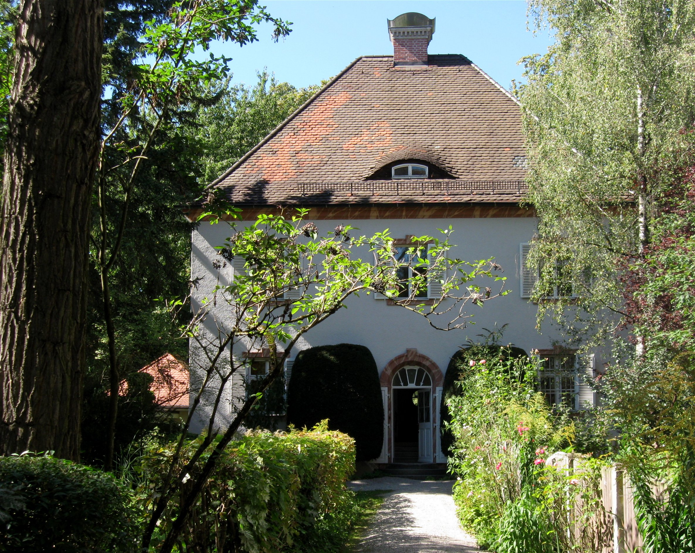 Mandlstraße 9; Villa, zweigeschossiger Walmdachbau, 1925 von Theodor Lechner und Fritz Norkauer.